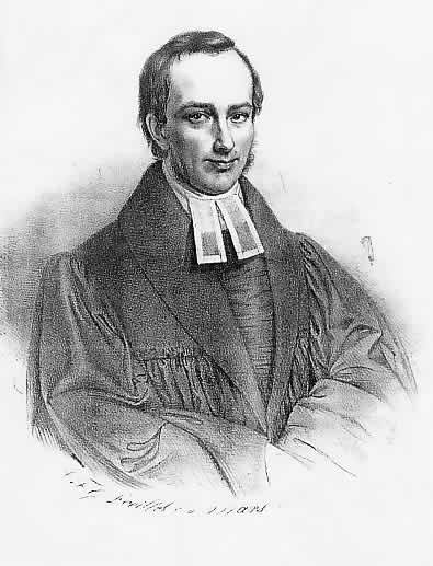 Portrait von Ludwig Otto Ehlers.